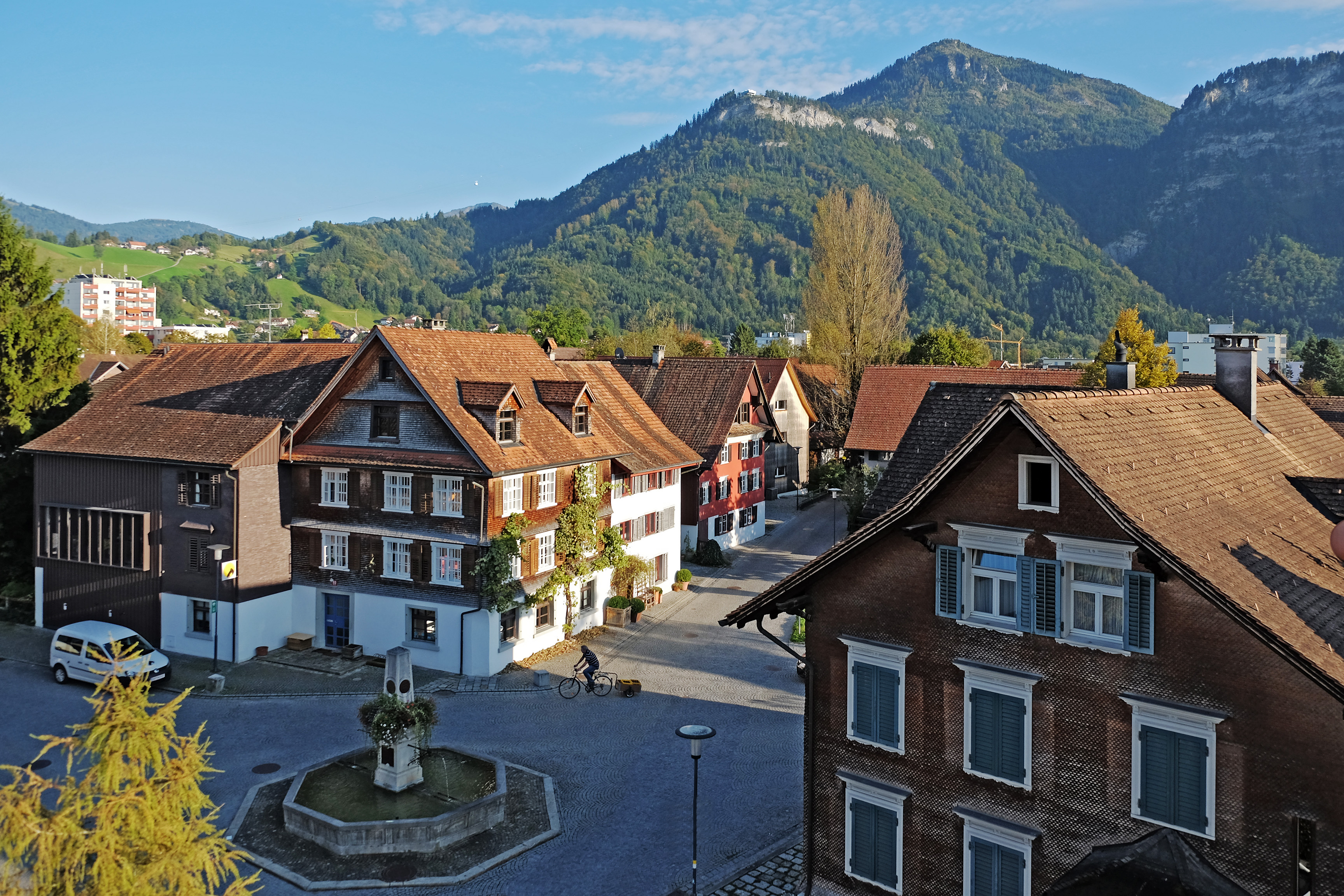 Dornbirn – „Dorfkern“ Hatlerdorf Dieses Bild wurde anlässlich des österreichischen Tags des Denkmals 2014 in Vorarlberg eingereicht.